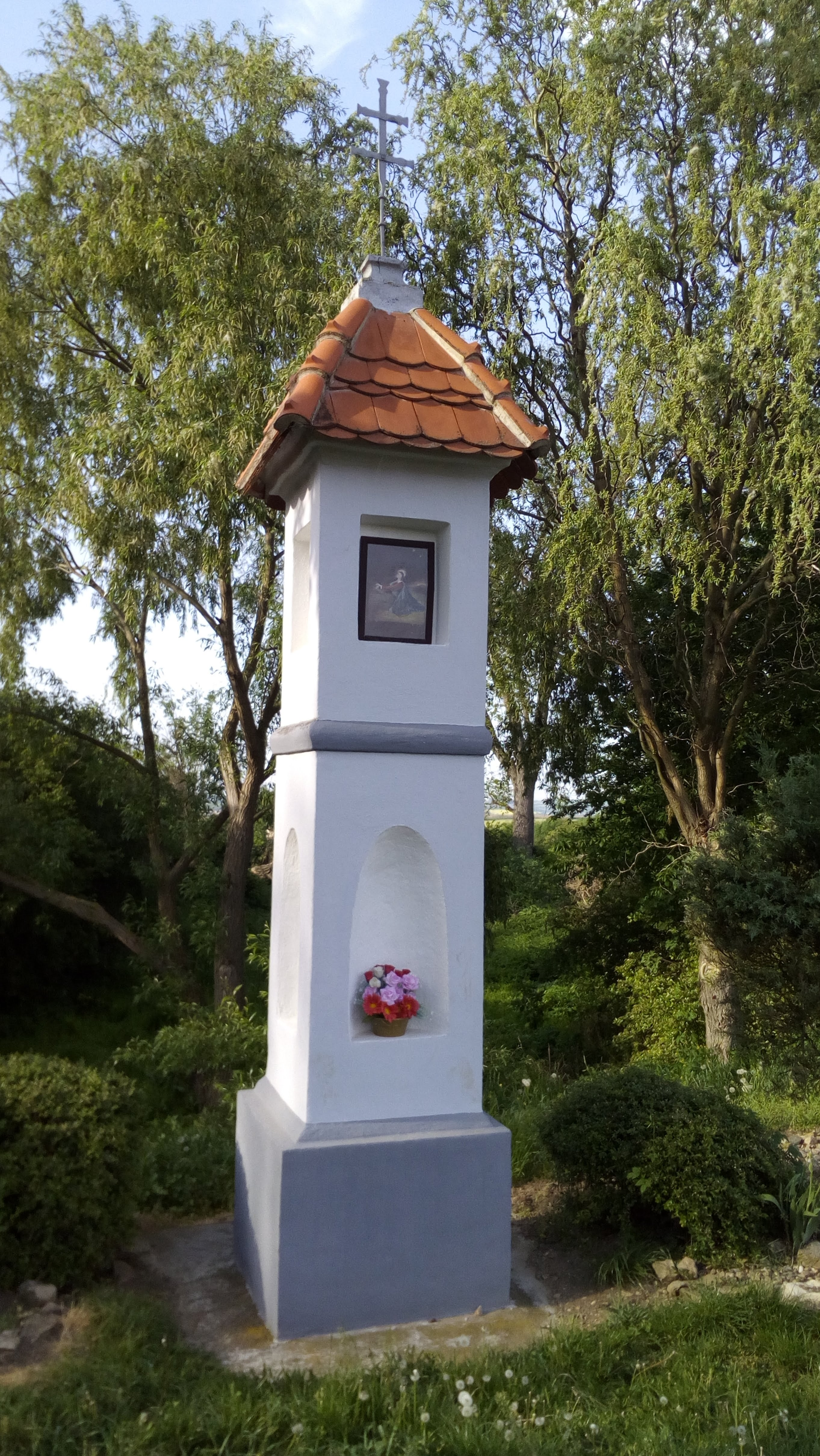 Boží muka v obci Polánka